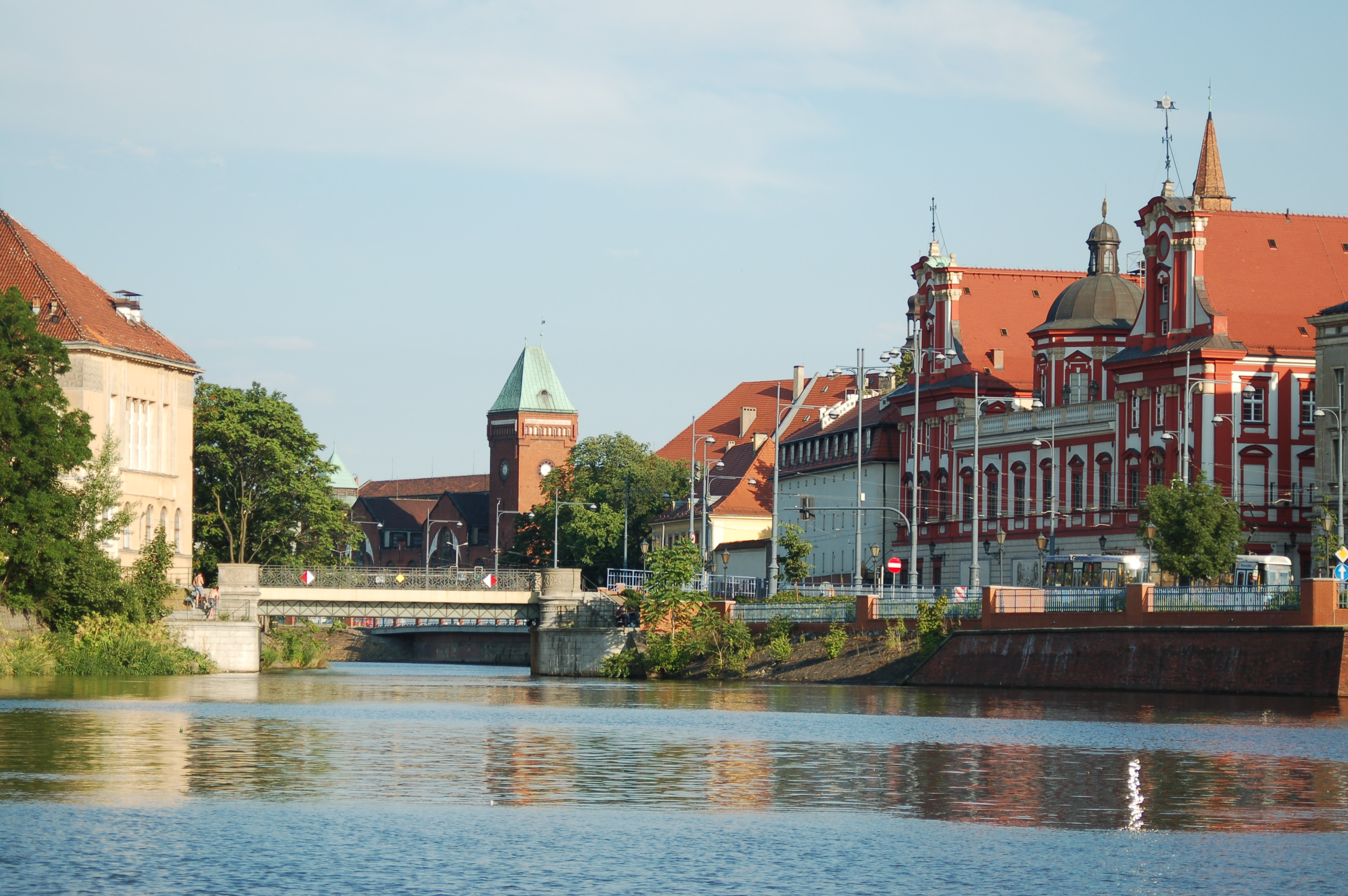 Fragment muru obronnego (ob. część elewacji budynku i ogrodzenie posesji) Grodzka 10-11, Miasto Wrocław - Stare Miasto